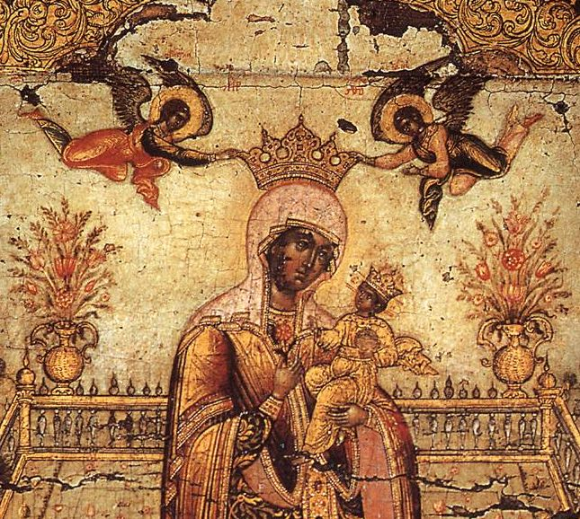 Фрагмент иконы Богородицы "Ветроград заключенный"